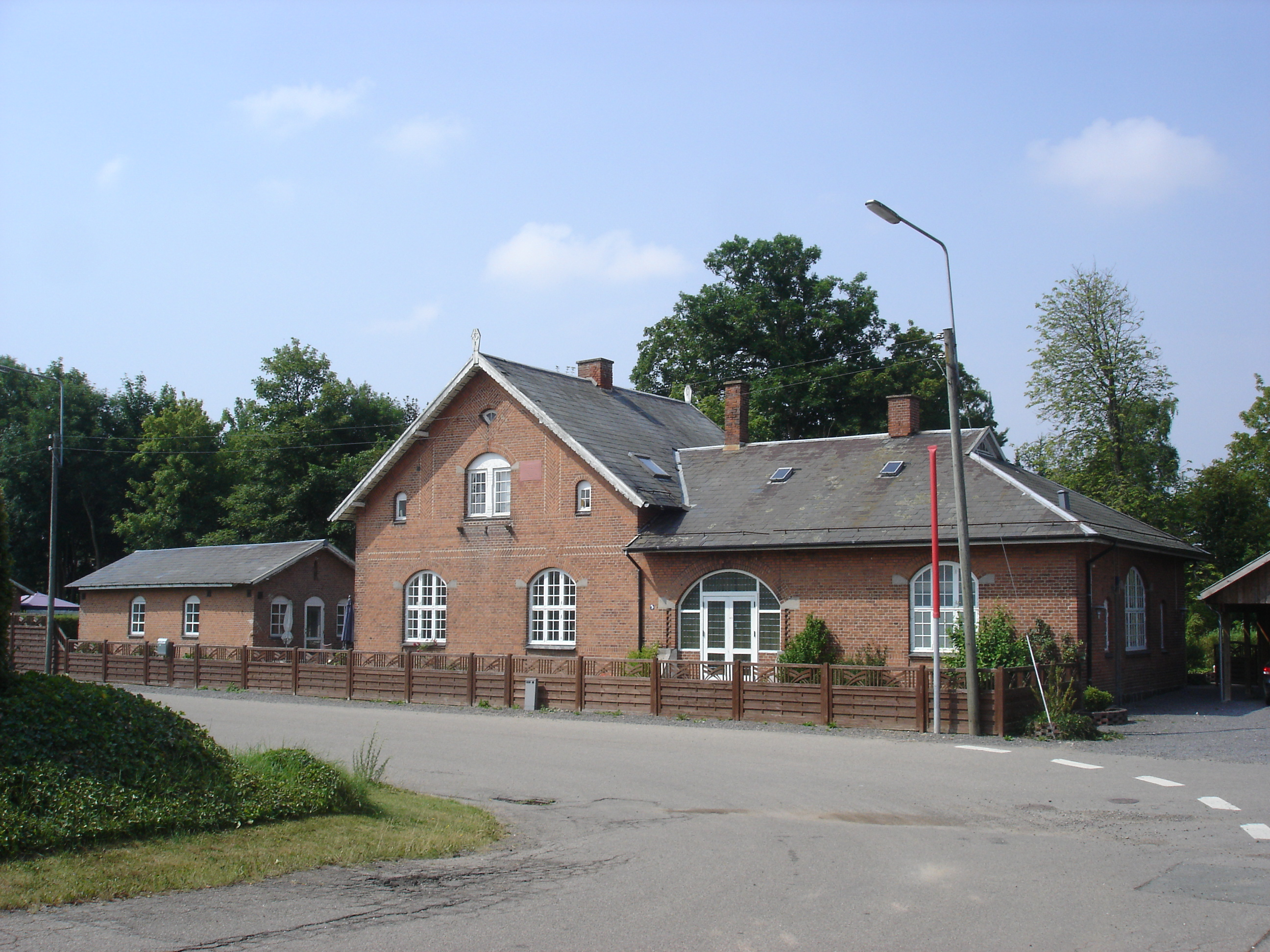 Jerslev Station fra vejsiden